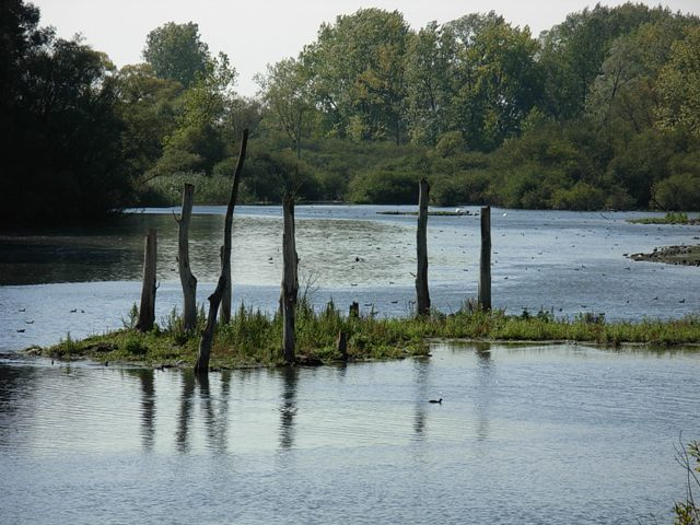 Marais de Fretin, au cœur du Val de Marque